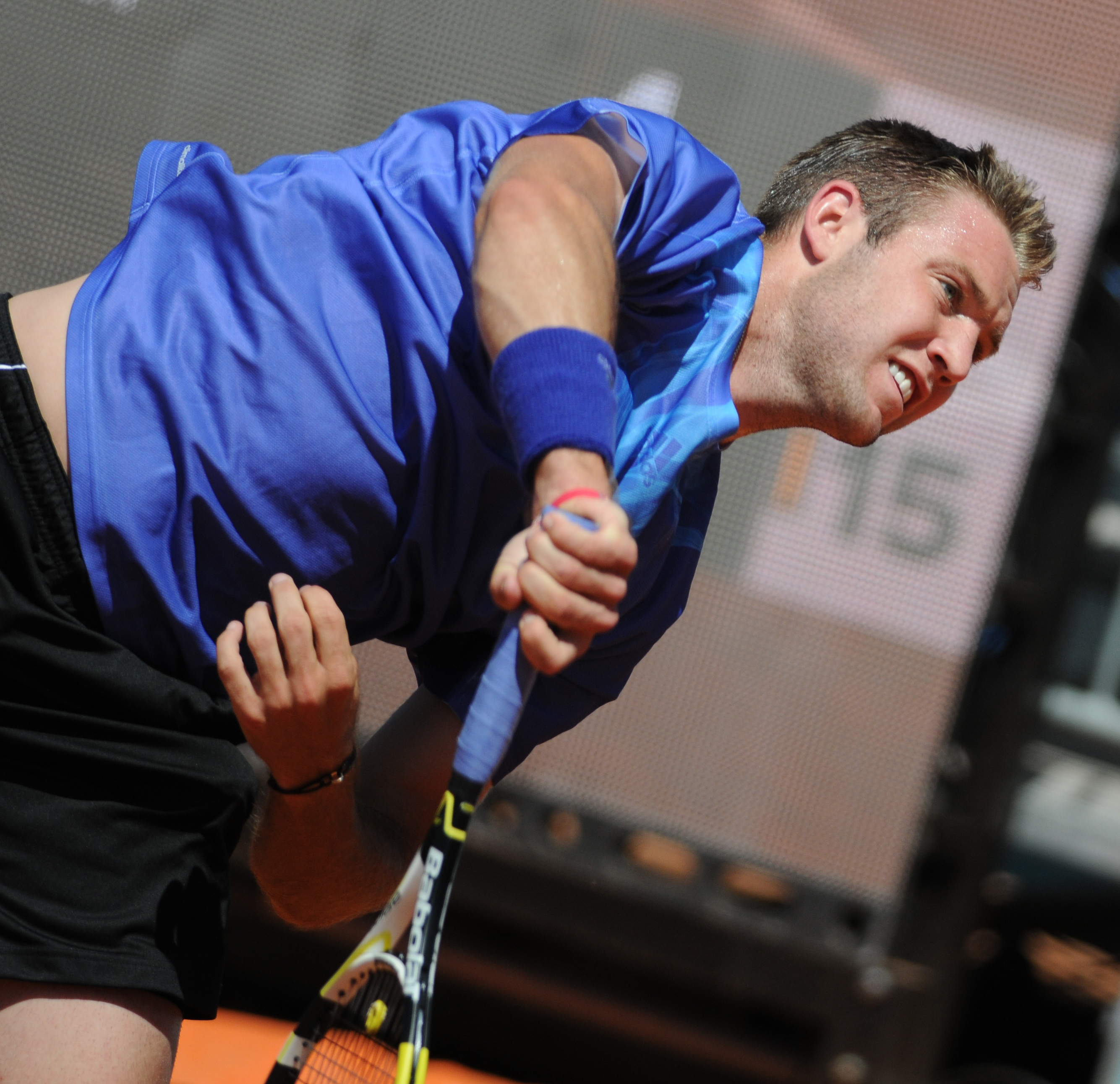 Jack Sock